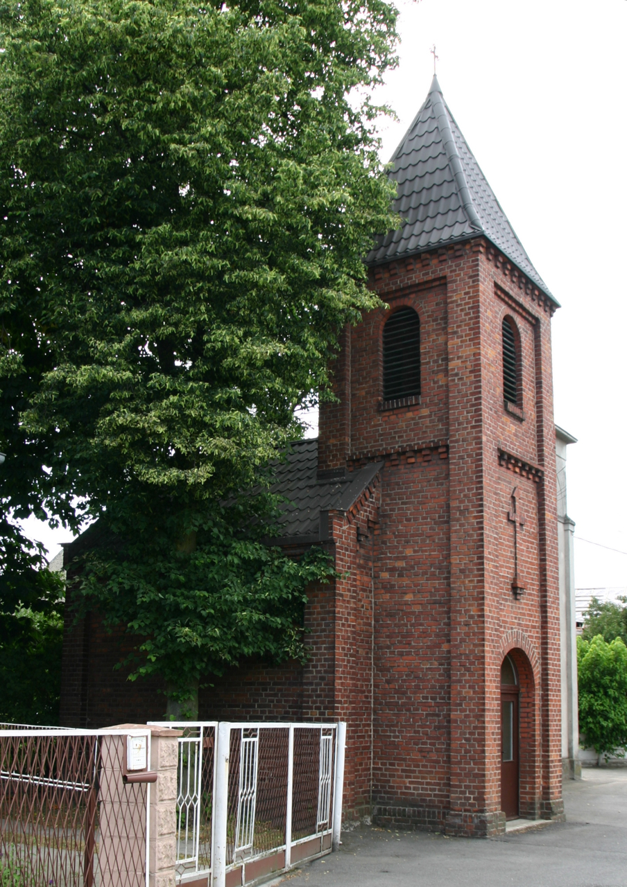 Steblów (niem. Stöblau) – wieś w Polsce położona w województwie opolskim, w powiecie krapkowickim, w gminie Krapkowice. Object location50° 27′ 09″ N, 17° 56′ 10″ E